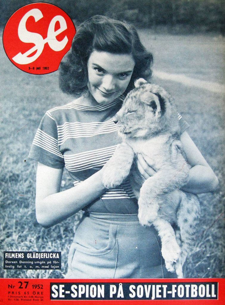 Foto på Doreen Denning på omslaget till Se 1952:27 (utgiven 3 juli 1952).